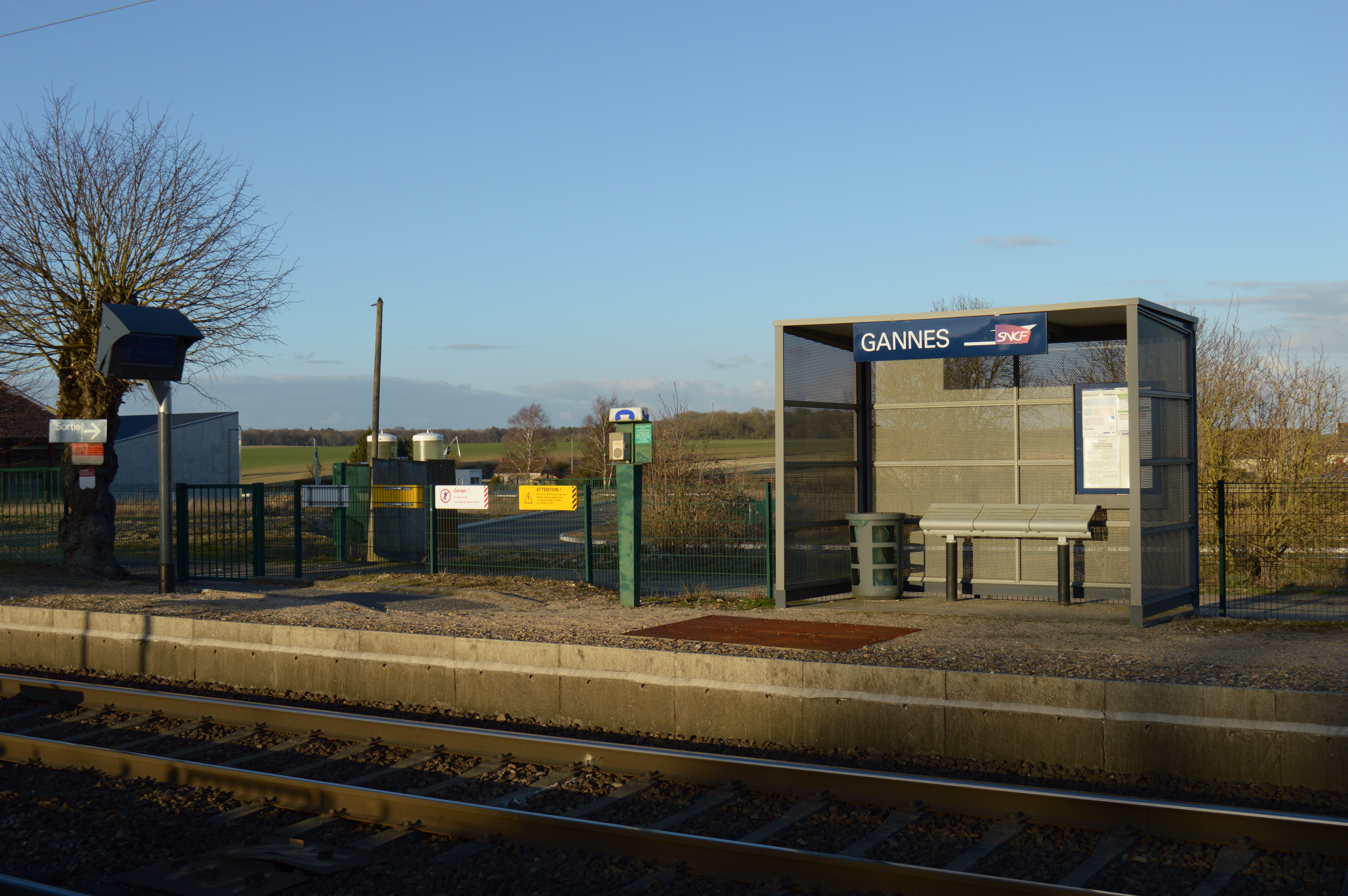 Abri voyageurs, téléphone et écran d'information, en gare de Gannes, département de l'Oise, France.